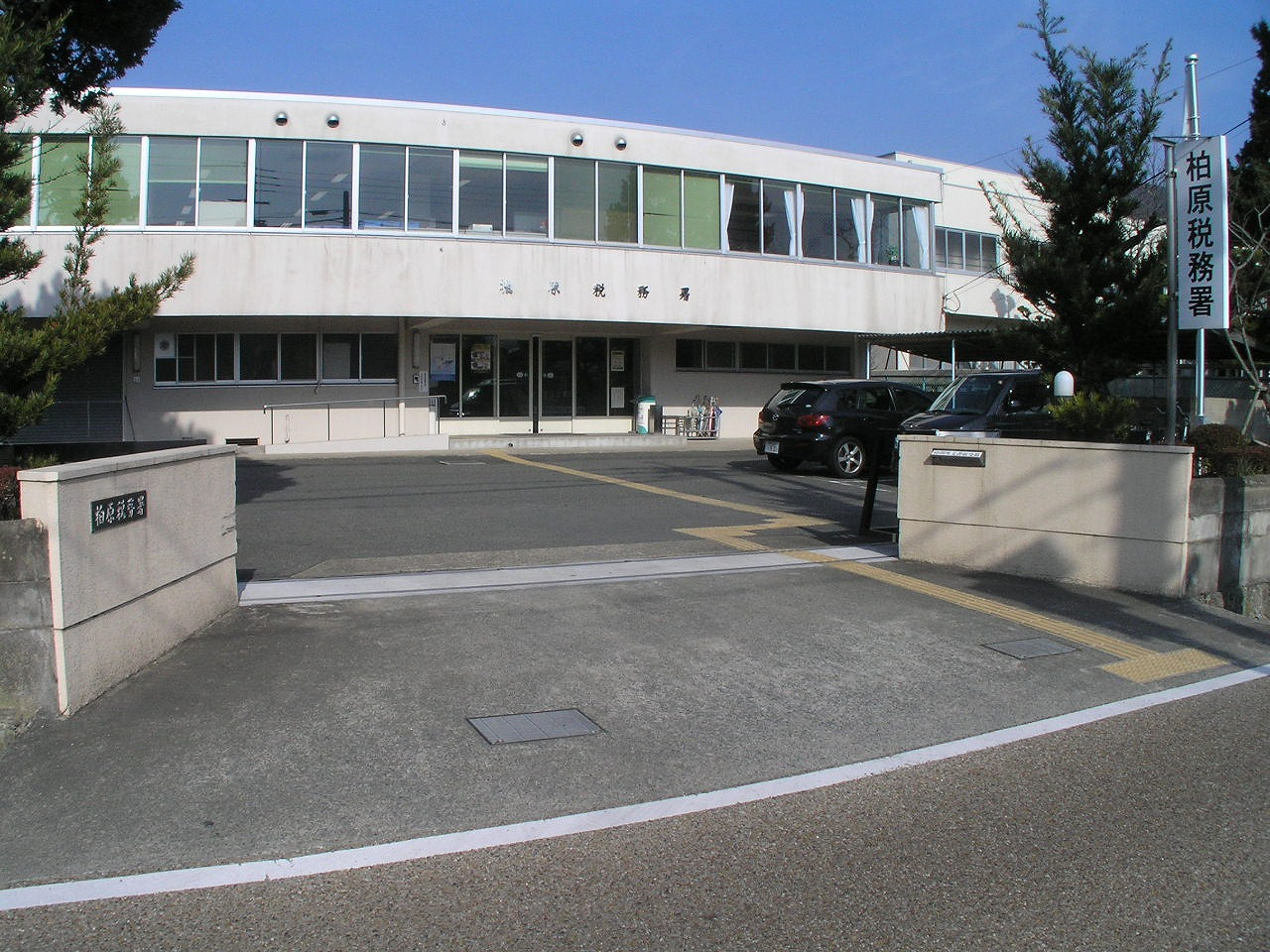 柏原税務署